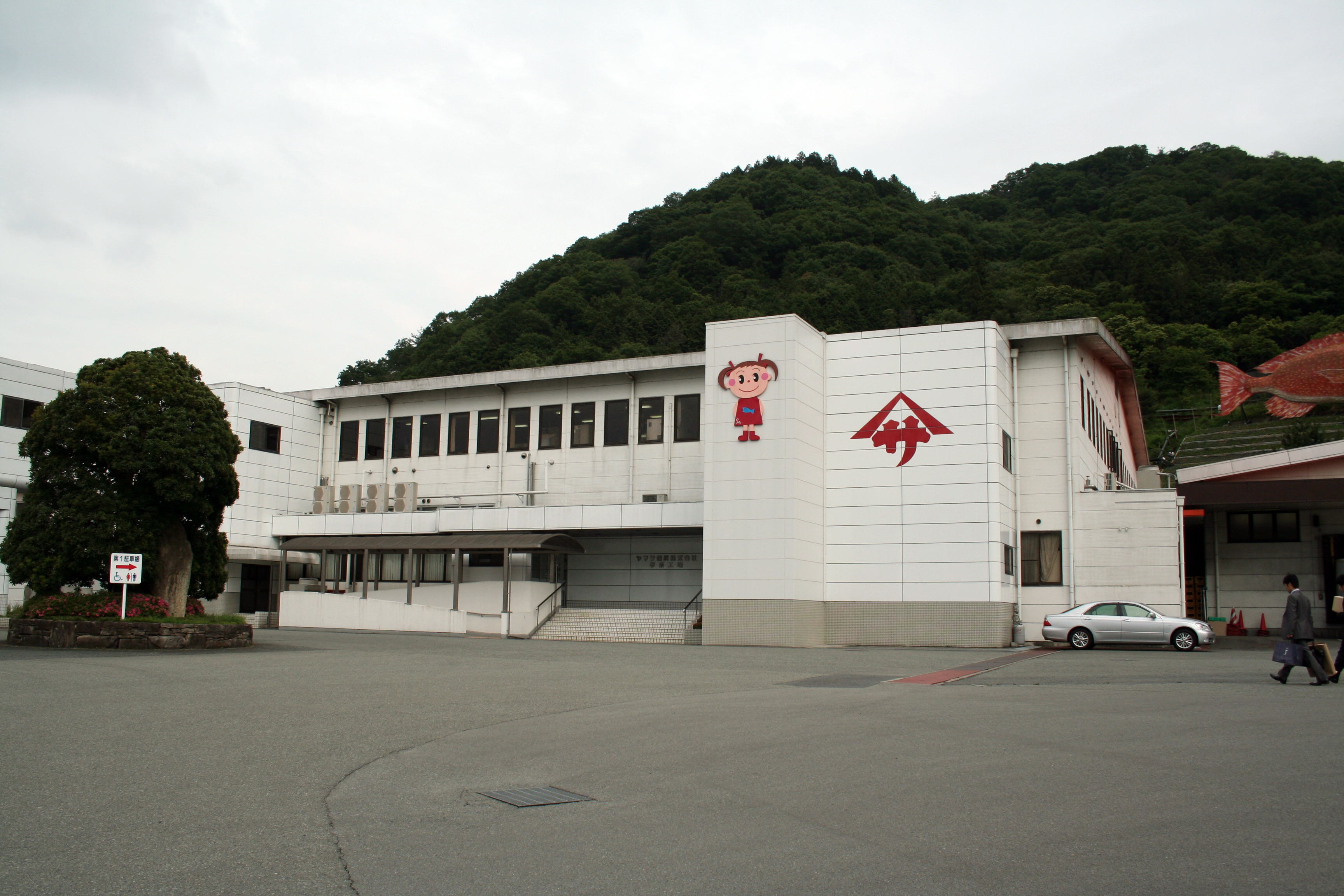 ヤマサ蒲鉾株式会社。